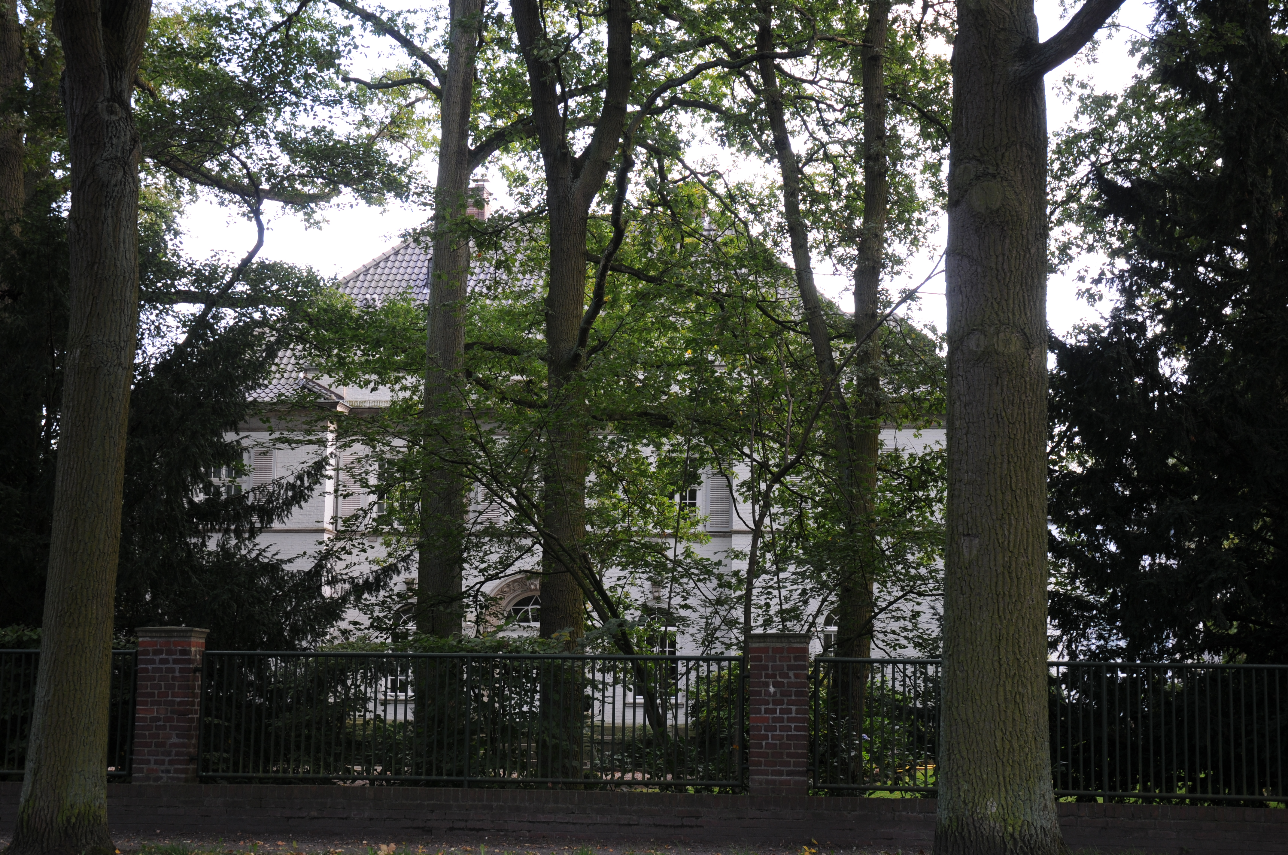 Landhaus Krages in Bremen, Marcusallee 11.Das abgebildete Objekt ist ein geschütztes Kulturdenkmal in der Freien Hansestadt Bremen, mit der Nr. 0870 beim Landesamt für Denkmalpflege registriert. Landhaus Krages versteckt hinter Bäumen